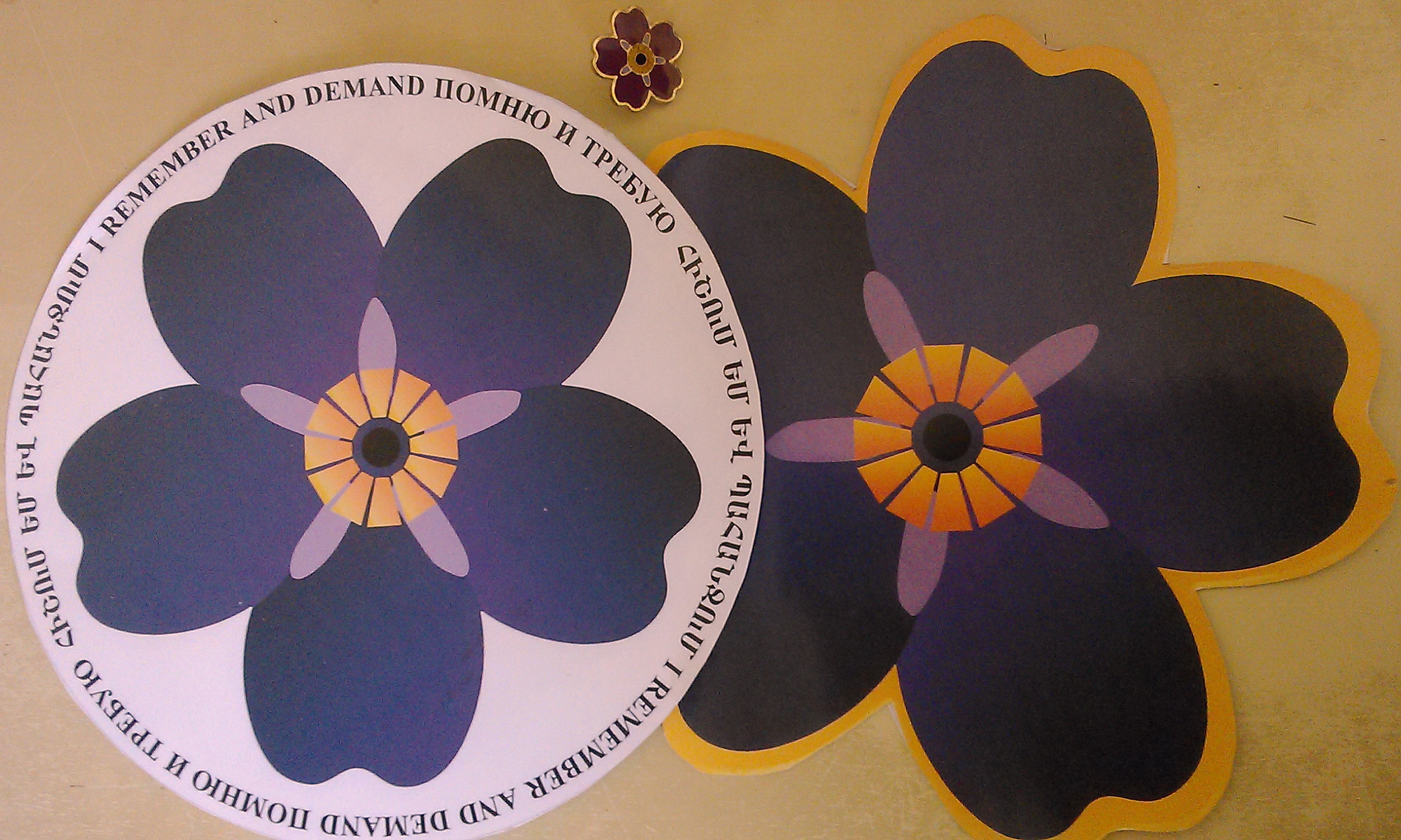 Armenian forget-me-not souvenirs (2015)